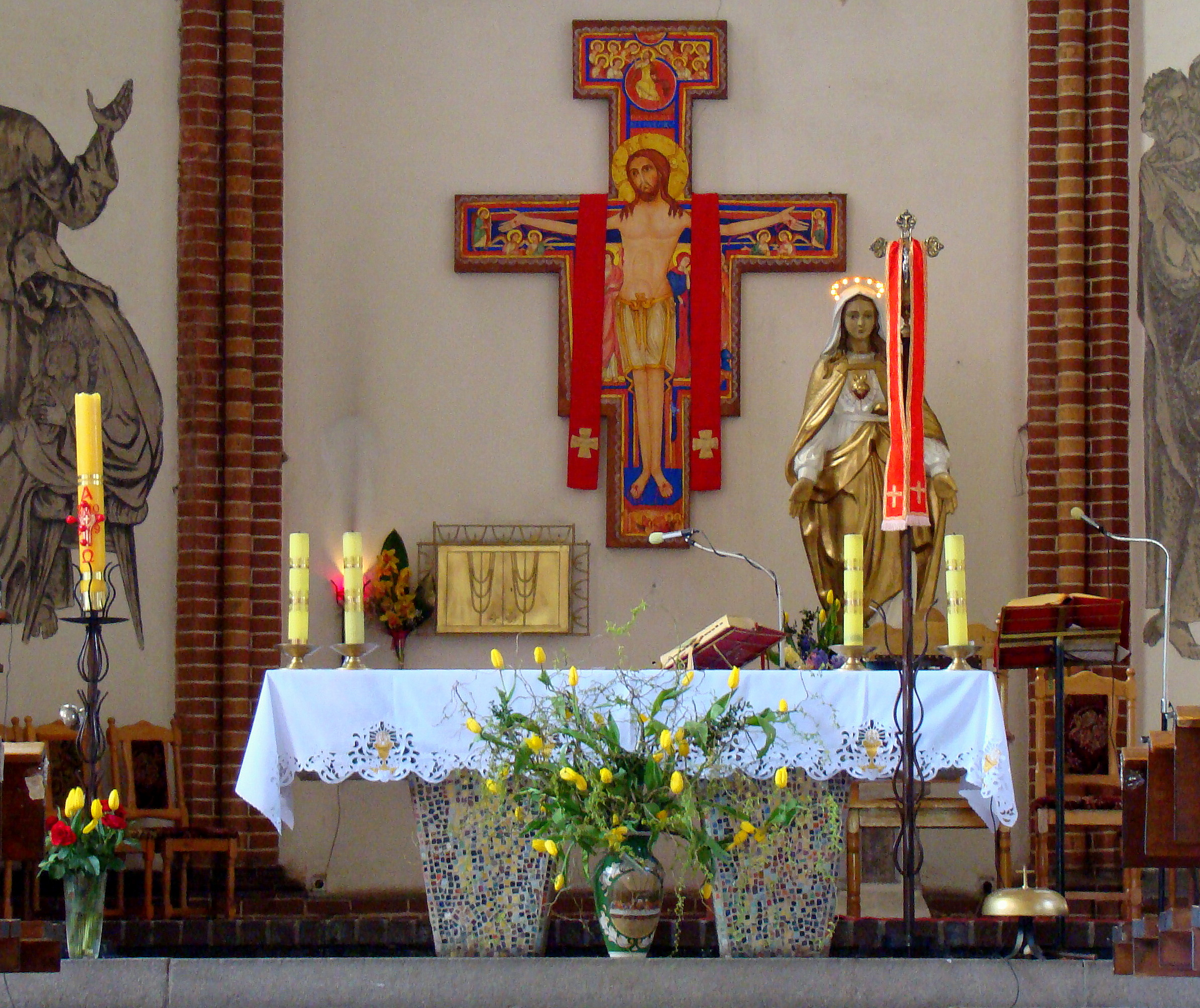 Kościół Niepokalanego Poczęcia NMP w Policach (prezbiterium), Polska